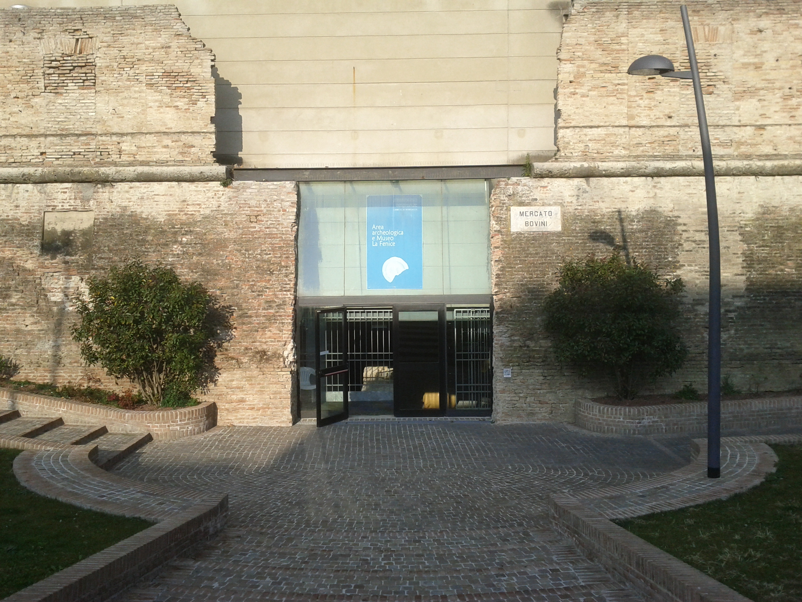 Area archeologica la Fenice di Senigallia - 20120121